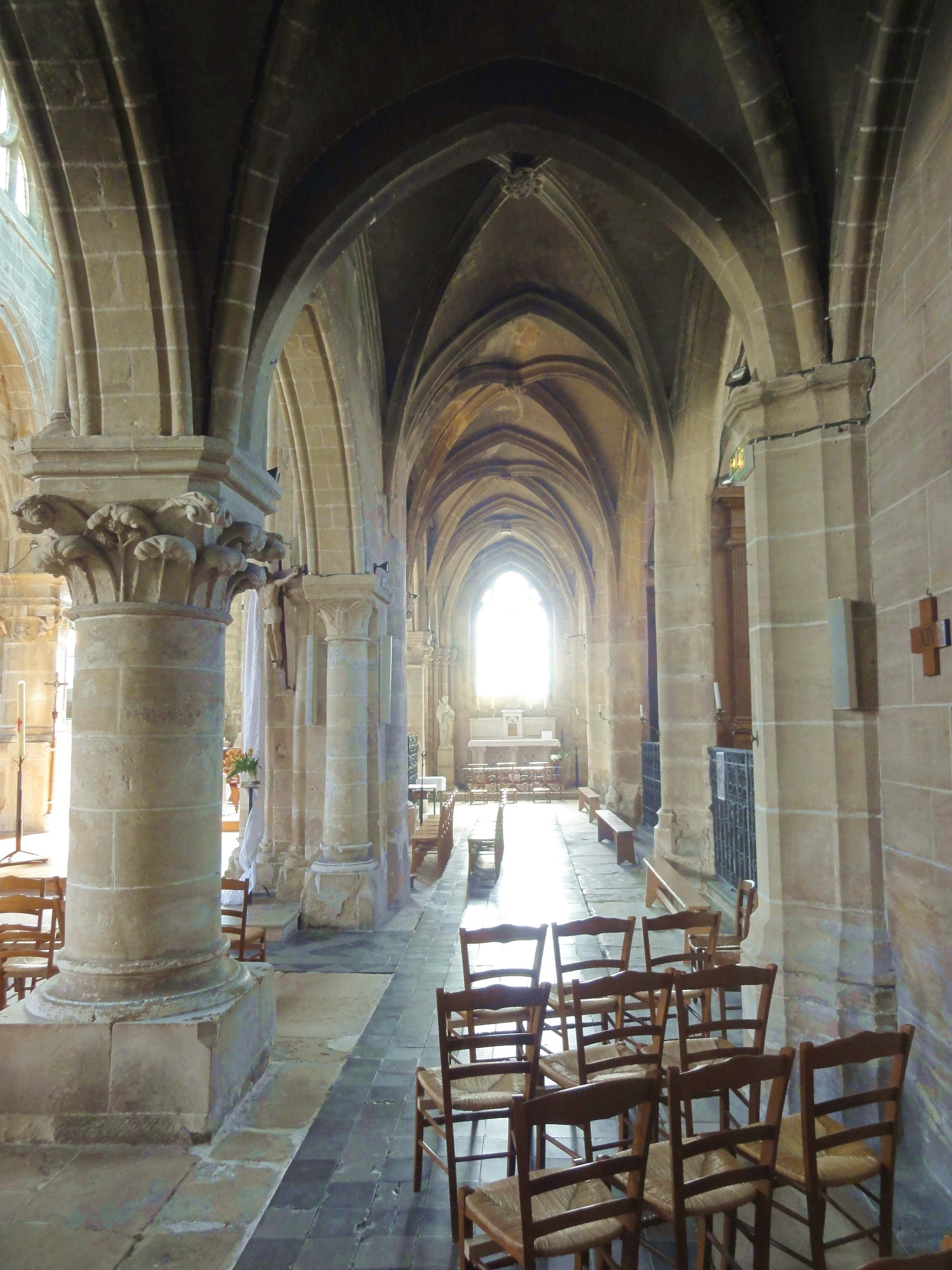 Intérieur de l'église - voir titre.